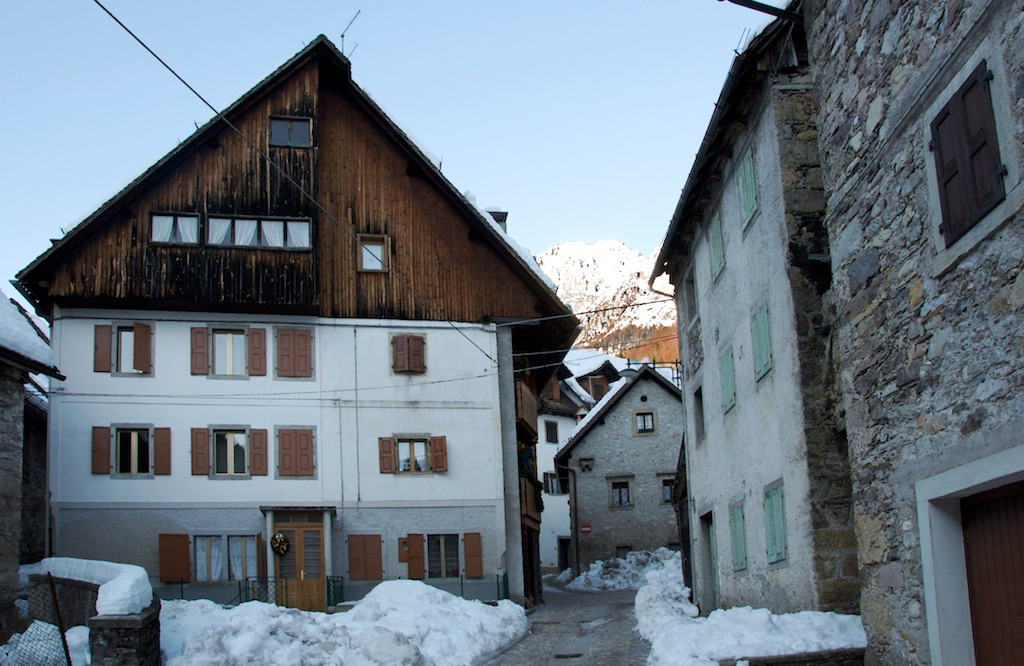 Furlan: une tipiche viodude di Pesaria